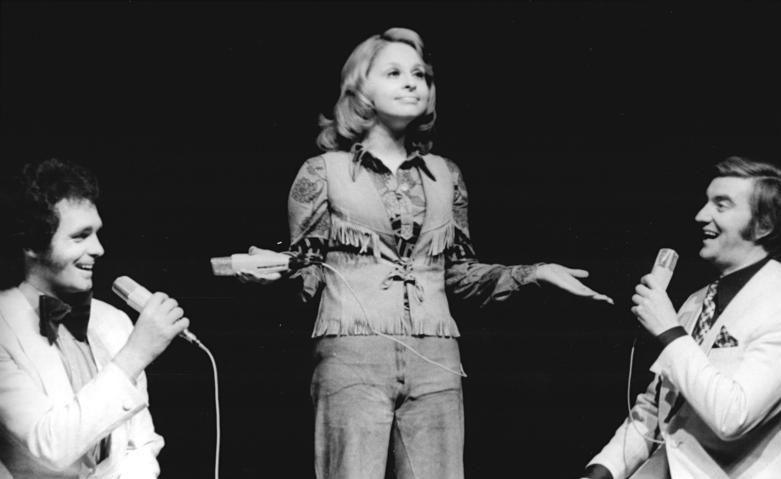 Michael Hansen, Dagmar Frederic, Peter Wieland ADN-ZB Franke 11-5-73 Berlin: Neue Revue "Expo 73" im Friedrichstadtpalast Heiter und beschwingt, musikalisch und tänzerisch will diese Revue im Monat Mai besonders die Freunde der Tanzmusik, des Balletts und des Musicals ansprechen. Auftritt von Michael Hansen (l.), Dagmar Frederic (M.) und Peter Wieland (r.). Abgebildete Personen: Frederic, Dagmar: Schlagersängerin, DDR Hansen, Michael: Schlagersänger, DDR Wieland, Peter: Schlagersänger, DDR